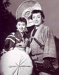 『名月佐太郎笠』、1955年、スチル写真